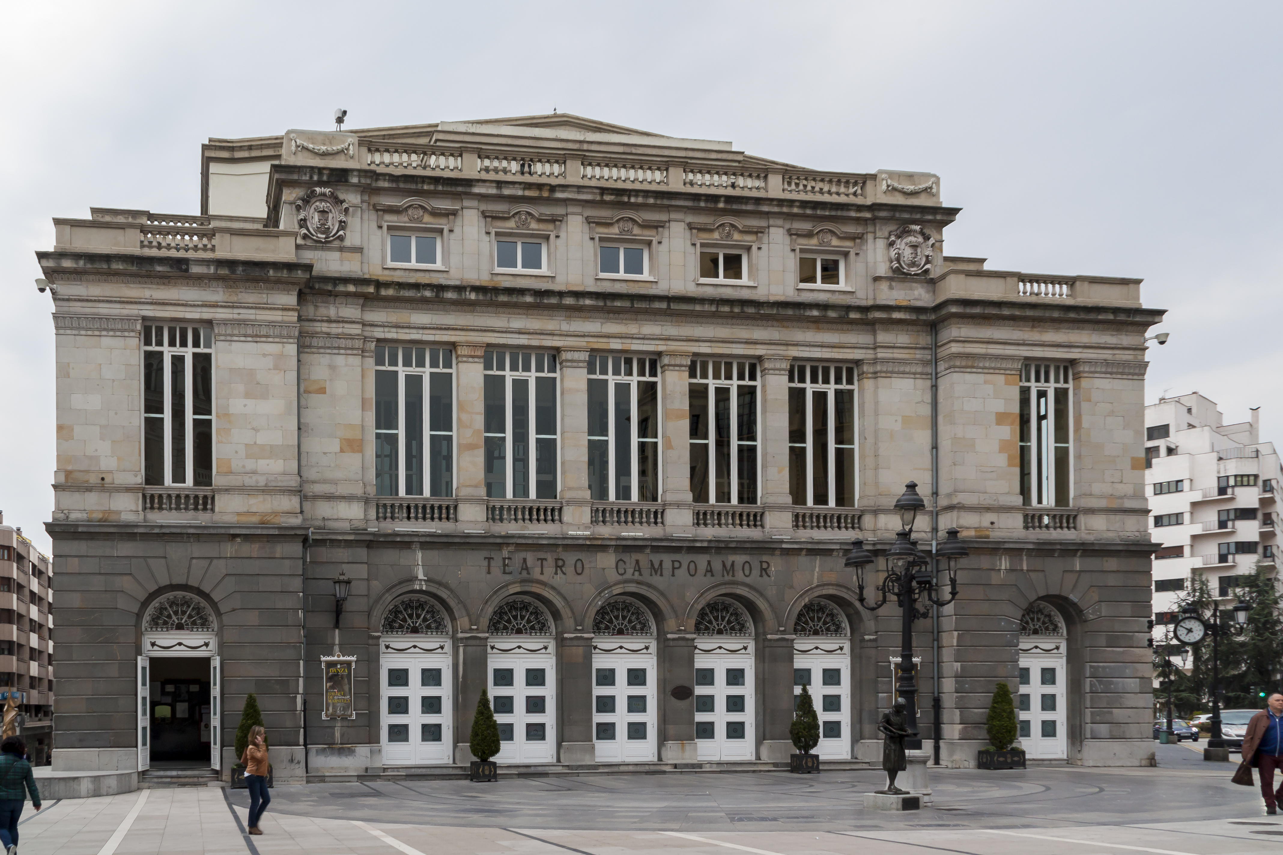 Oviedo, de ayer a hoy.